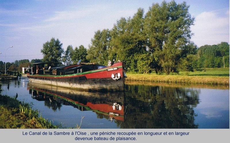 Le canal de la Sambre à l'Oise emprunté par les bateaux de plaisance hélas aujourd'hui impraticable car barré à cause de 2 ponts canaux à refaire